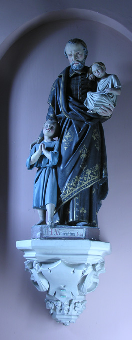 Statue of saint Vincent de Paul